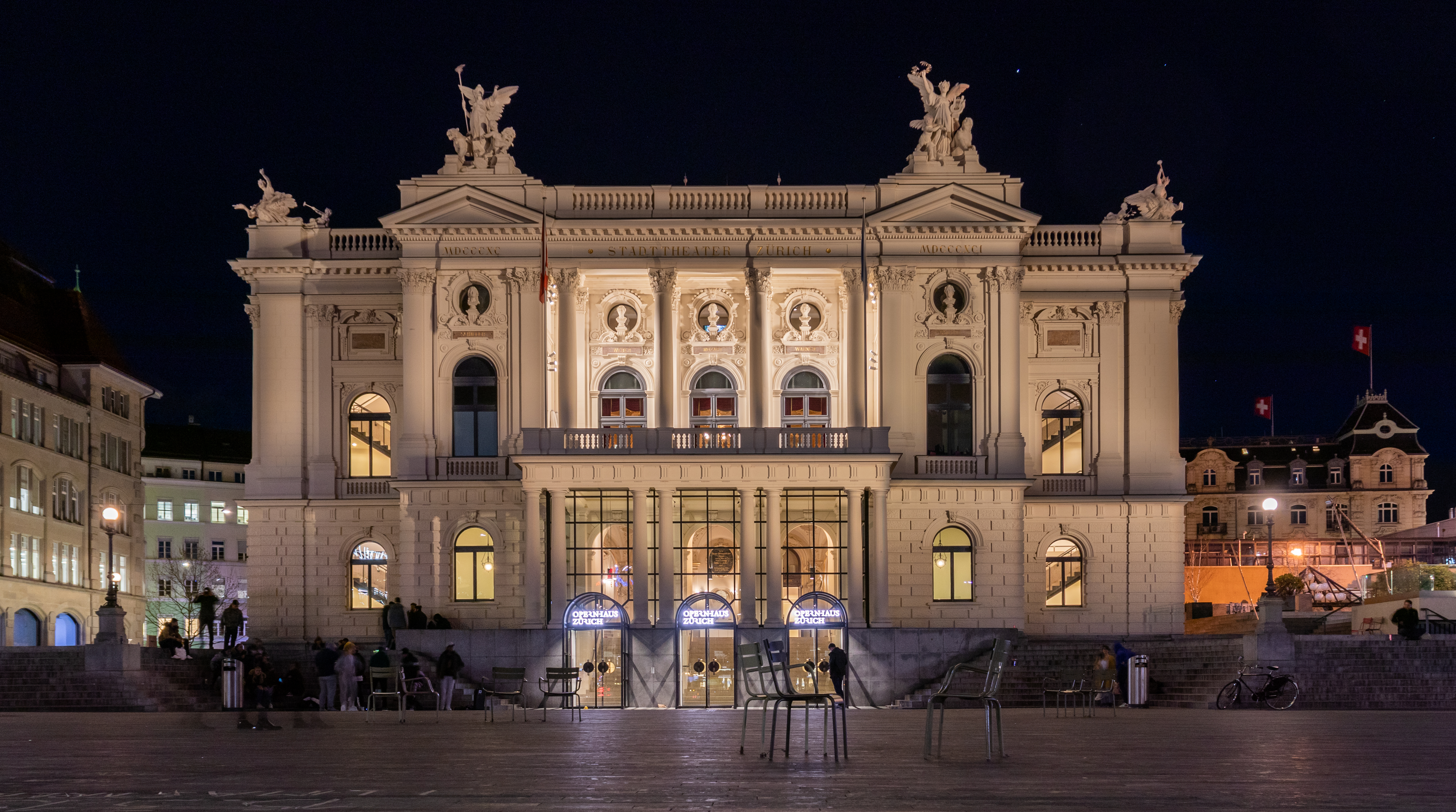 Das Opernhaus Zürich am Abend